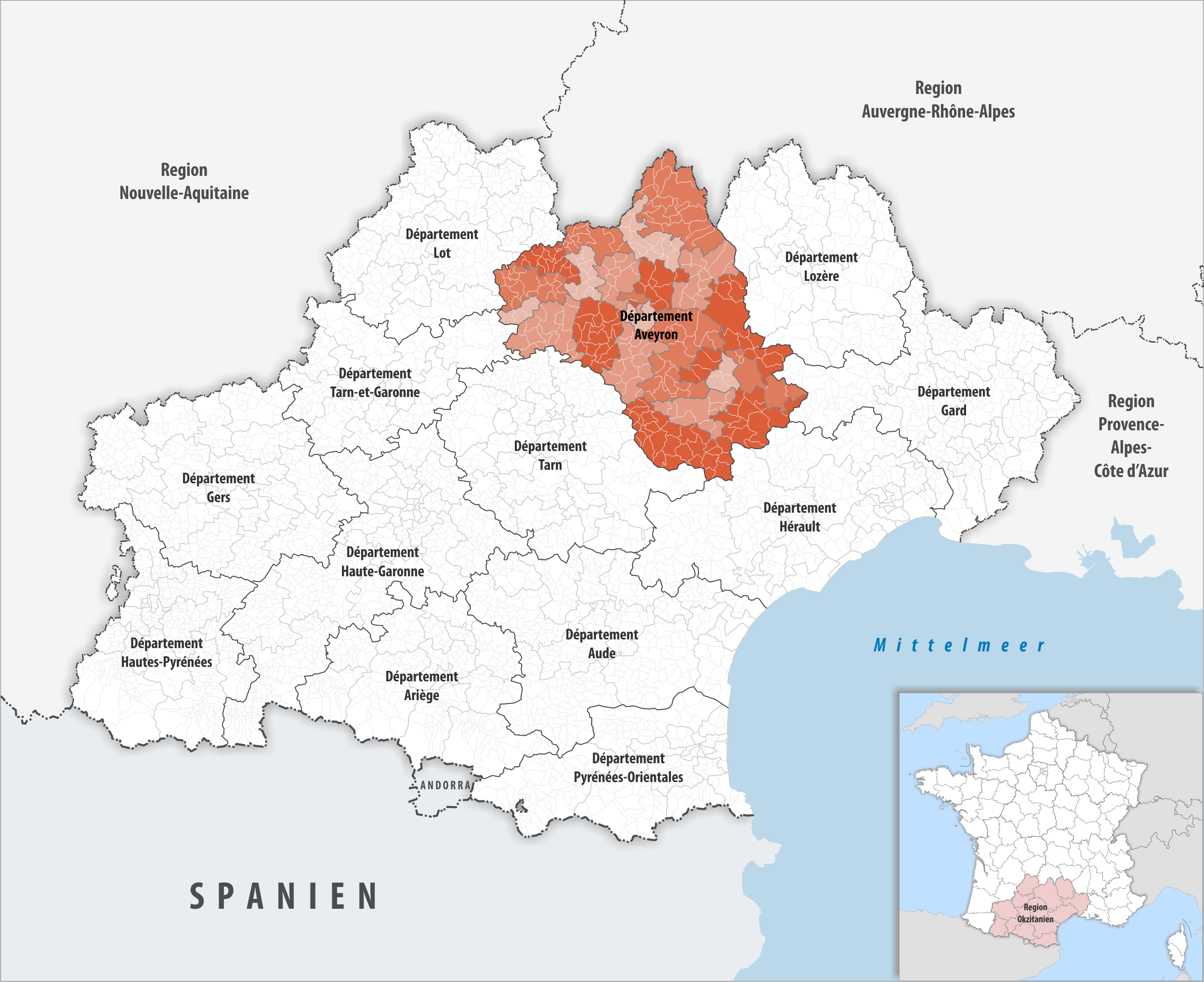 Lage des Departements Aveyron